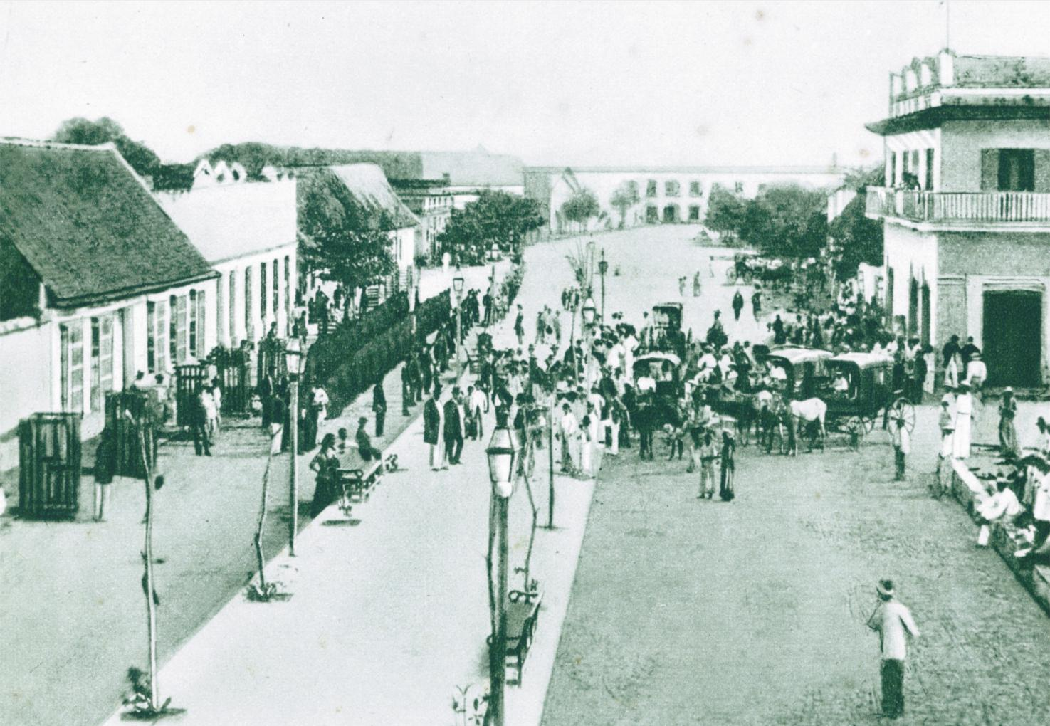 Ancien "Camellón Abello" (aujourd'hui appelée Paseo de Bolívar).